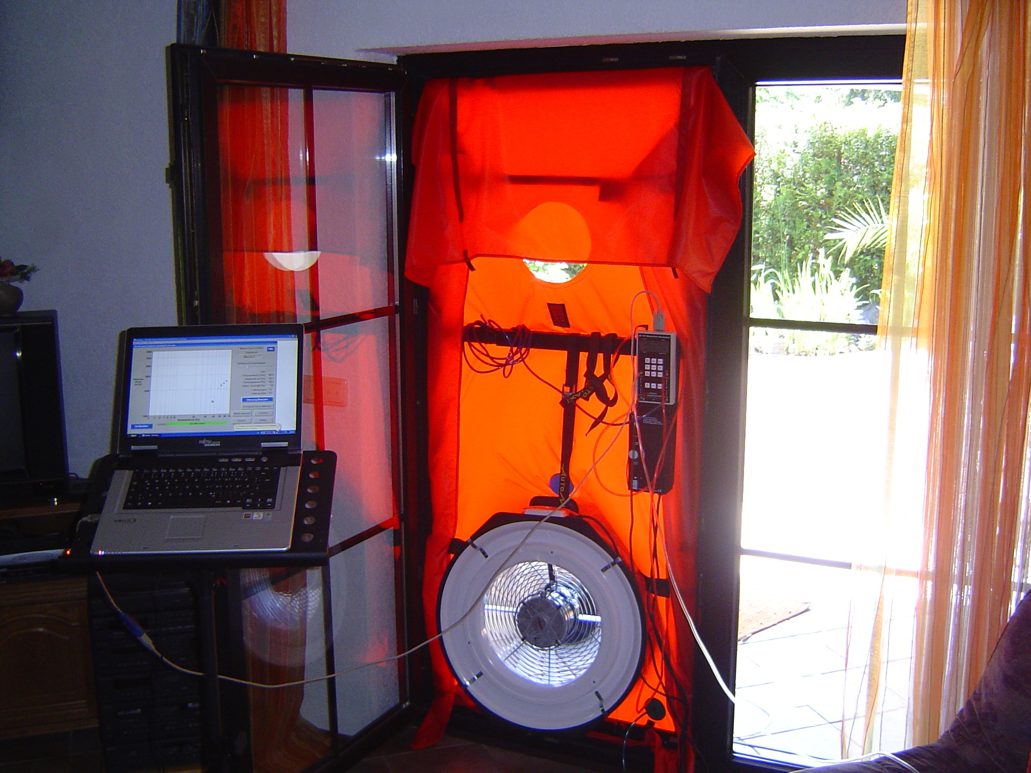 In einer Terrassentür eingebautes digitales Blower-Door Prüfgerät (Differenzdruck-Messverfahren)